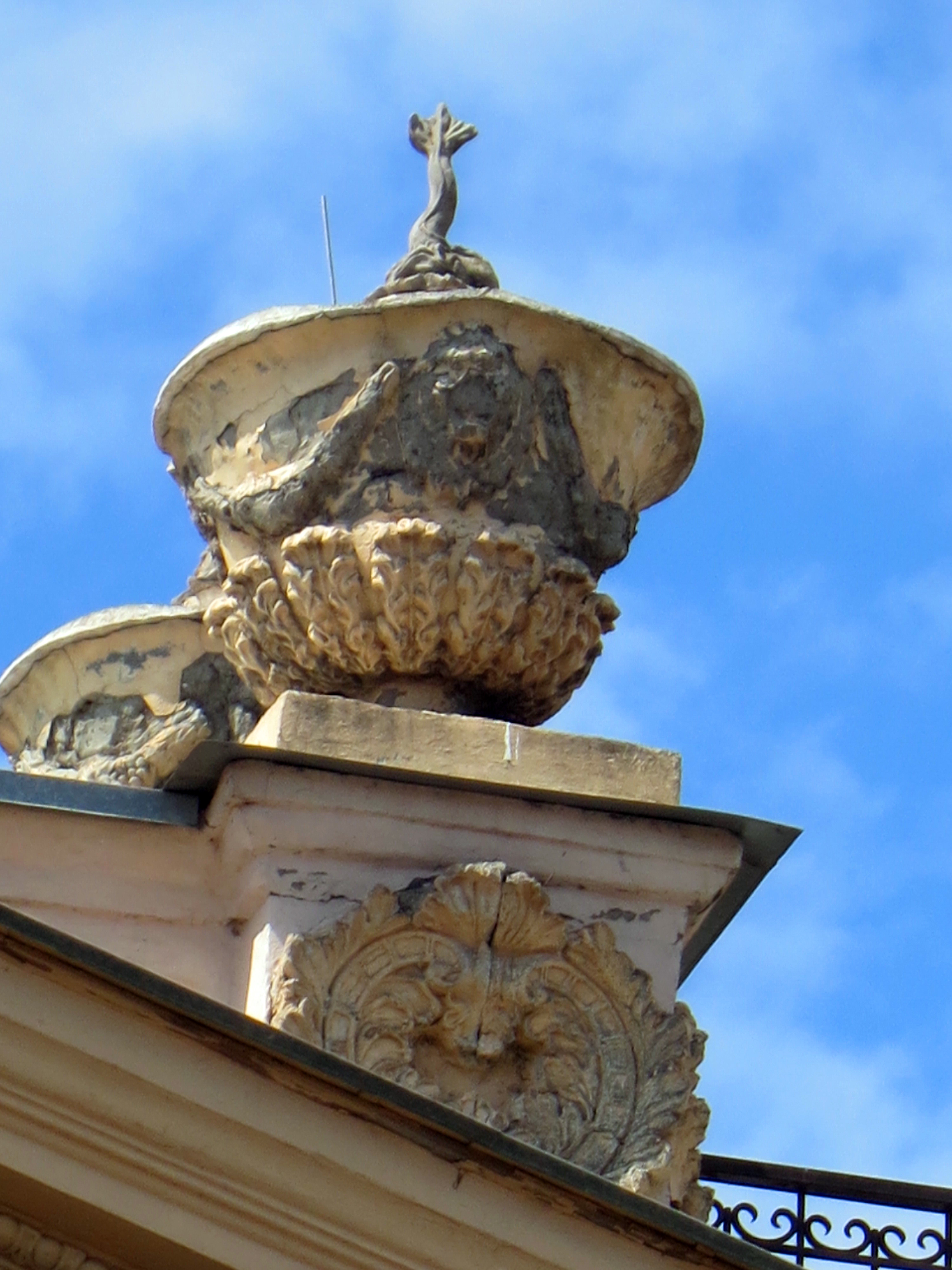 Дворец Алфераки С.Н. (Коммерческое собрание), здание музея: улица Фрунзе, 41 / улица Глушко, 13, Таганрог, Ростовская область